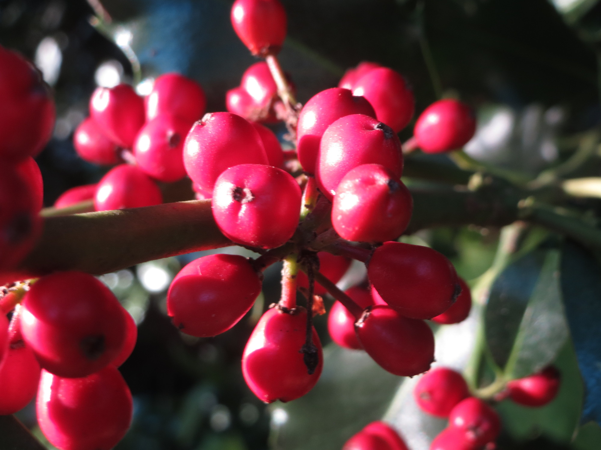 Amerikanische opaca (Ilex opaca) am Staden in Saarbrücken